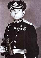 Владимир Филиппович Трибуц (1900 — 1977) — советский военачальник. Адмирал